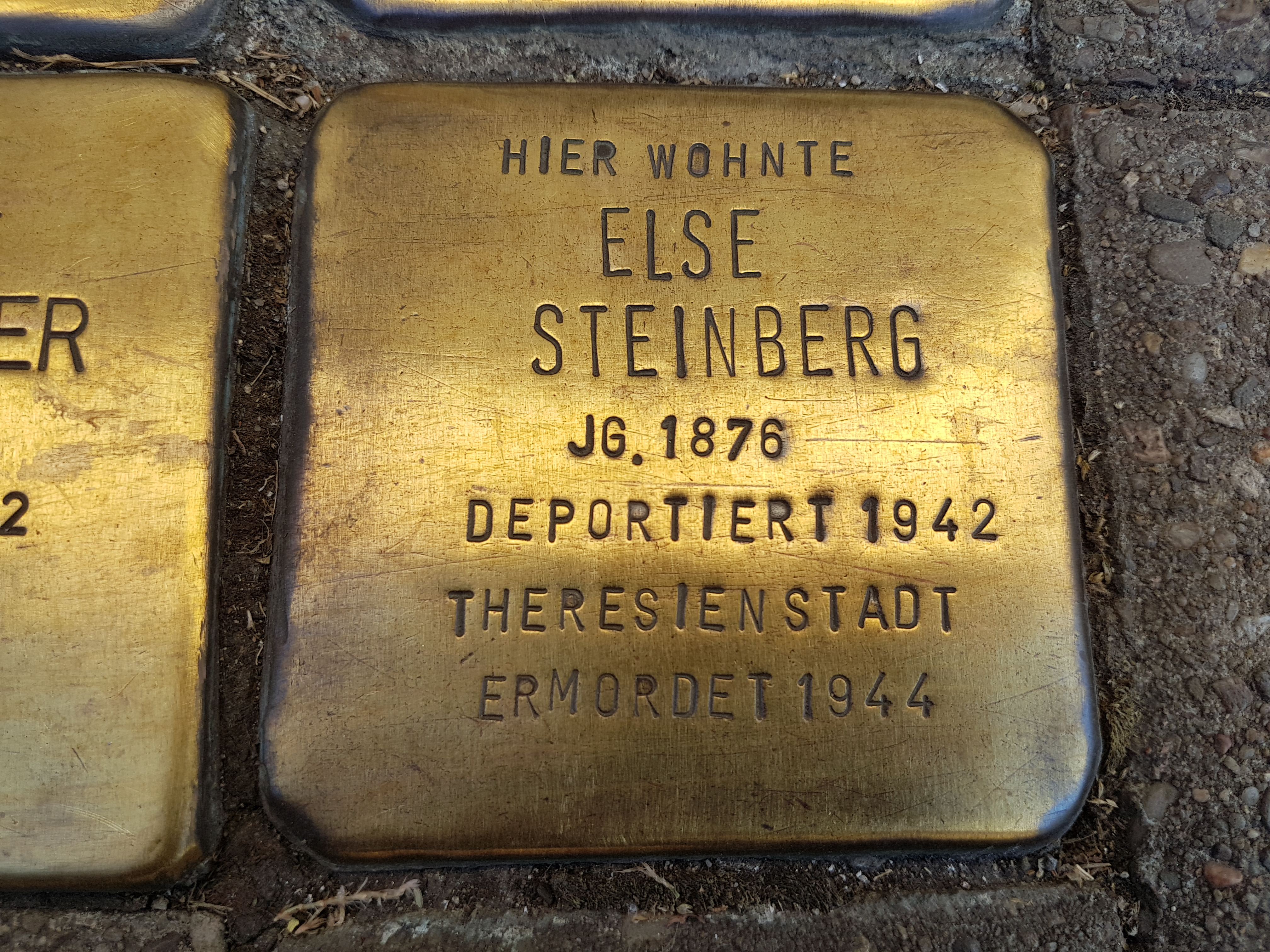 Stolperstein Duisburg Else Steinberg